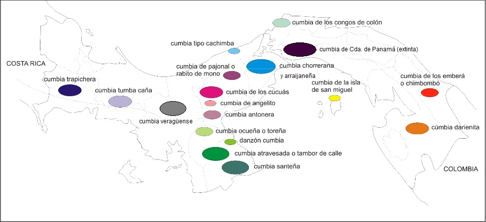 Este mapa señala las variantes de Cumbia en Panamá. Se utilizó como referencia los mapas desarrollados por Edwin Pitre en su Tesis Doctoral: Veredas Sonoras de Cumbia Panameña, presentado en Sao Paulo en 2008. Este Mapa señala adicionalmente la cumbia veraguense, arraijaneña y la variante extinta de la Ciudad de Panamá; que fueron omitidas por Pitre.